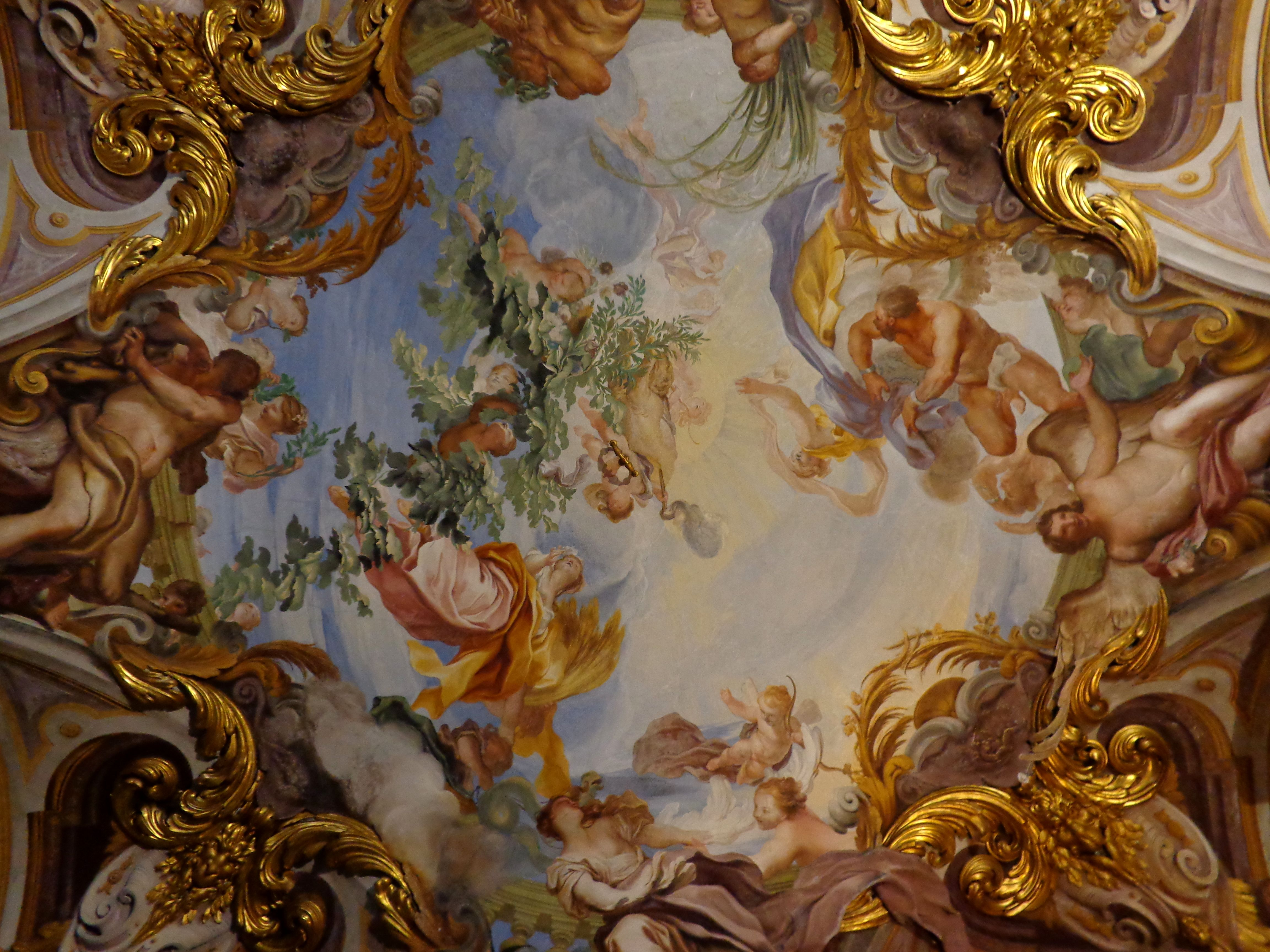 Palazzo Rosso - Musei di Strada Nuova This is a photo of a monument which is part of cultural heritage of Italy.